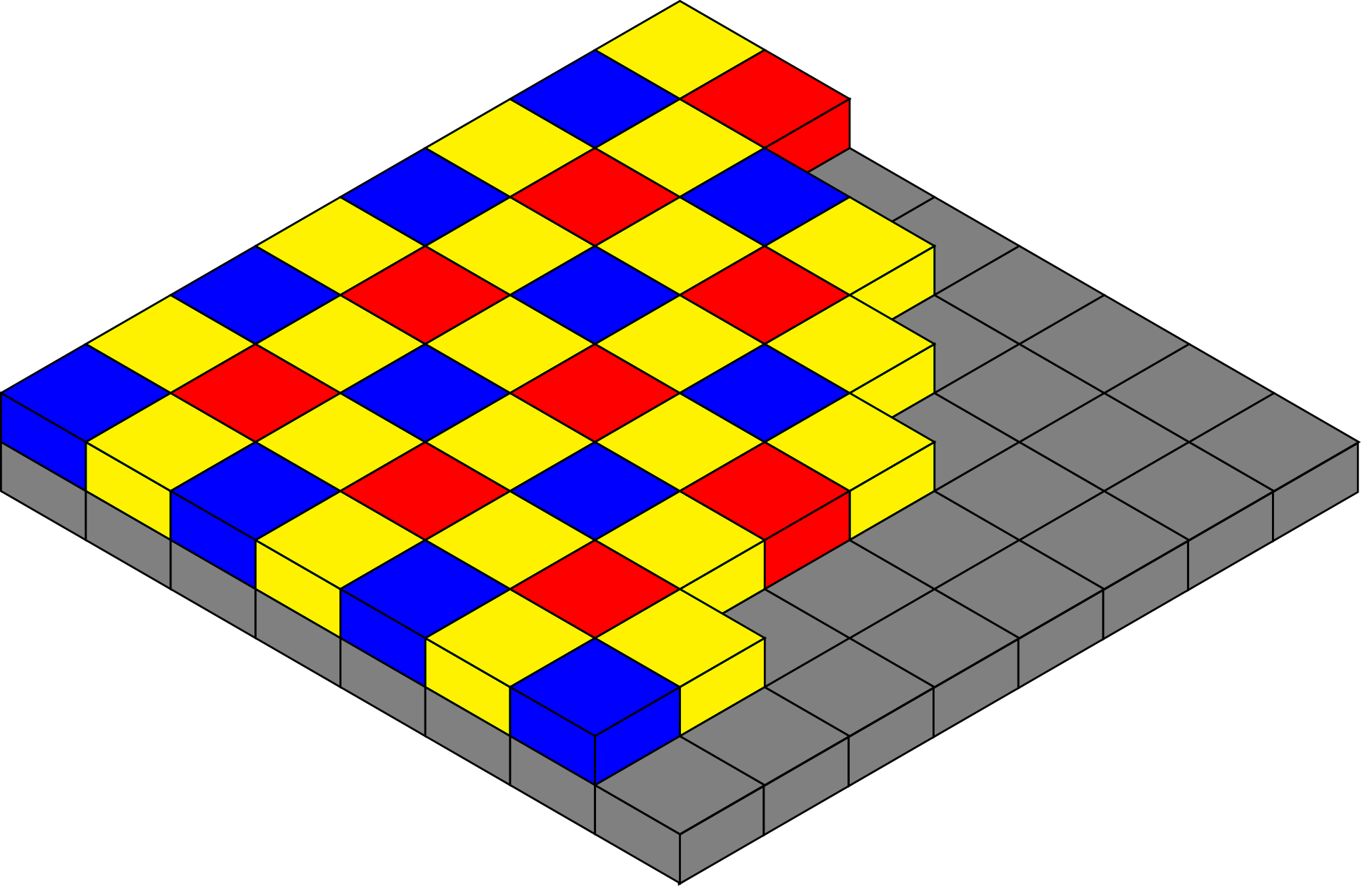 SuperSpectrum RYYB en prespectiva. Sensor utilizado en el Huawei P30 Pro con rojo, amarillo y azul.